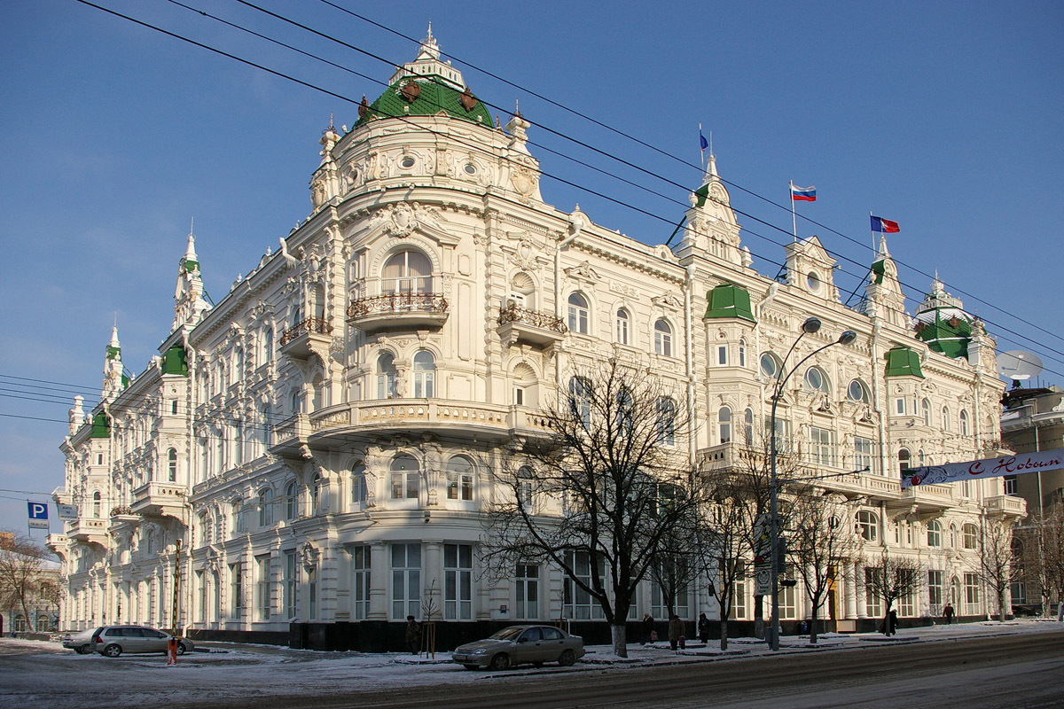 Здание администрации города Ростова-на-Дону